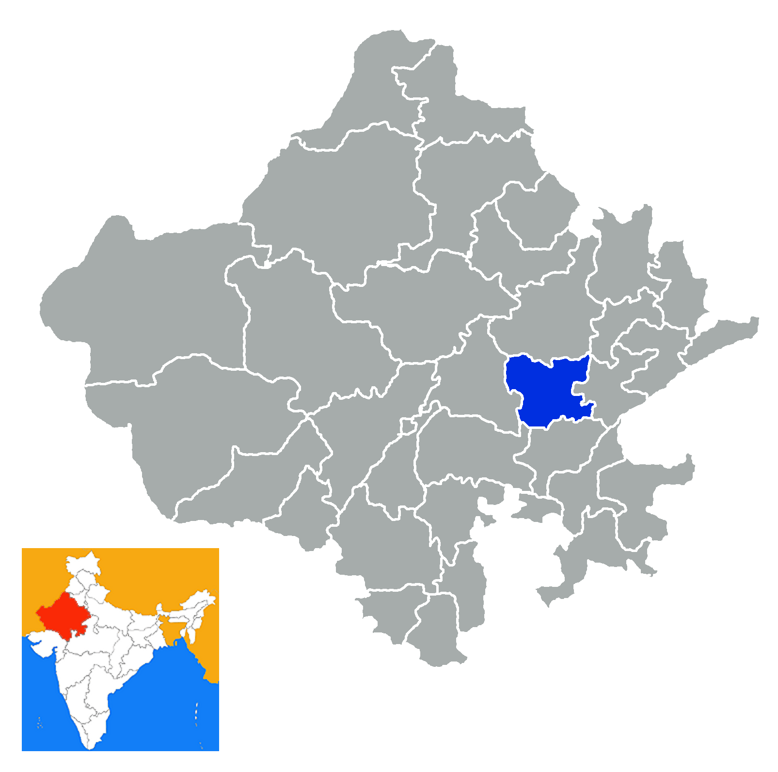 Distrito de Tonk Rajastan India